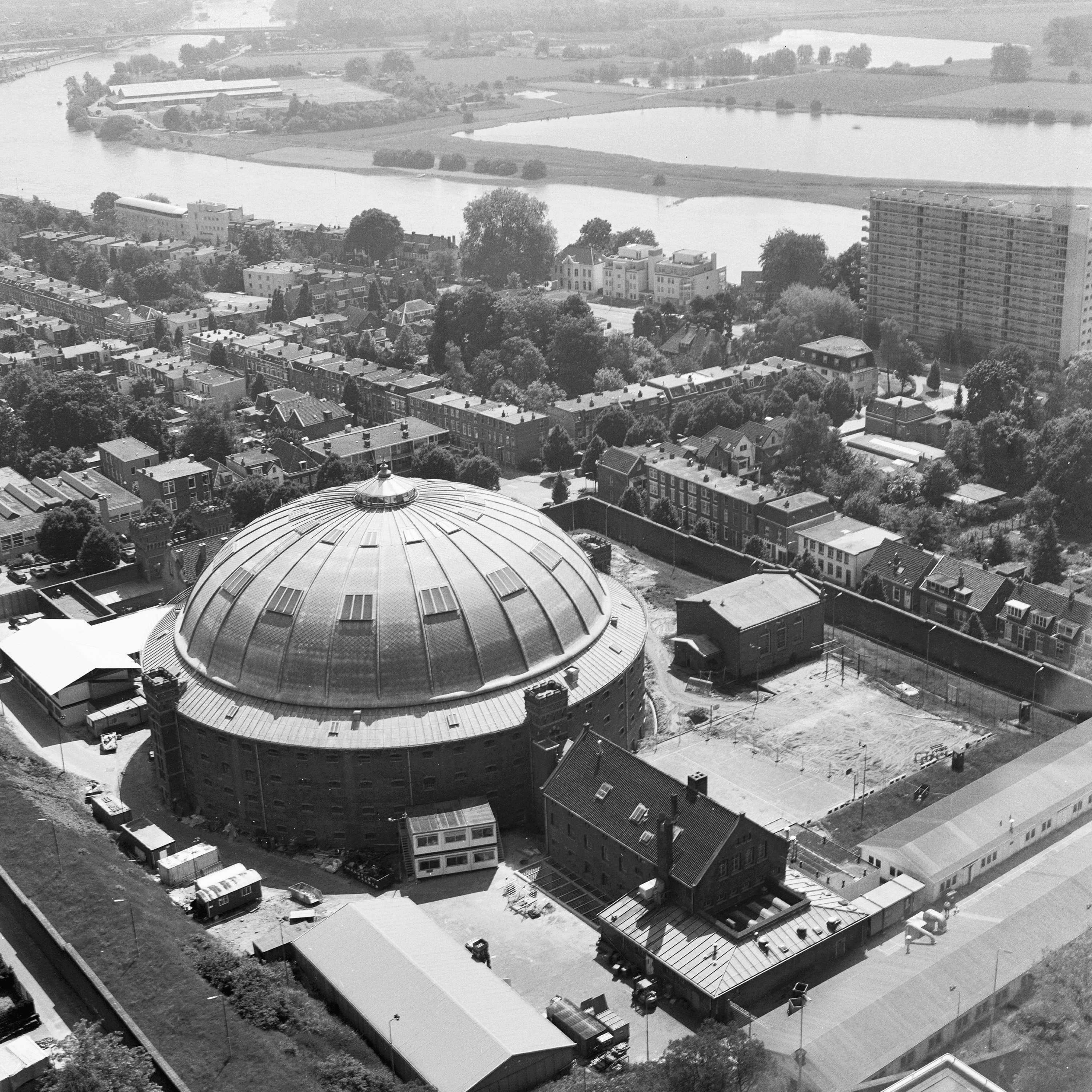 KOEPELGEVANGENIS: Exterieur OVERZICHT VANAF KEMA (B 52) STRAALVERBINDINGSTOREN (opmerking: Monumenten In Nederland GELDERLAND, BLADZIJDE 88)